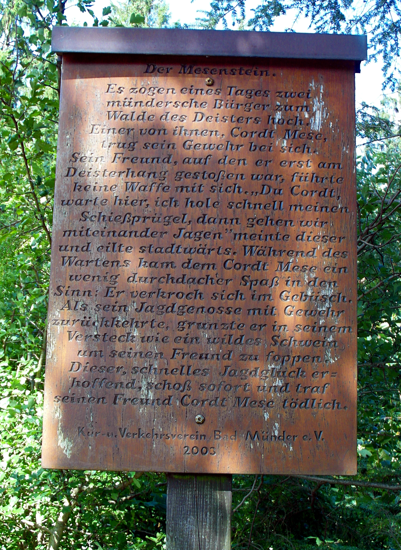 2003 vom Kur- und Verkehrsverein aufgestellte Holztafel beim Mesenstein am Panoramaweg am Deisterrand mit einer Kurzfassung von Cordt Meses Geschichte.